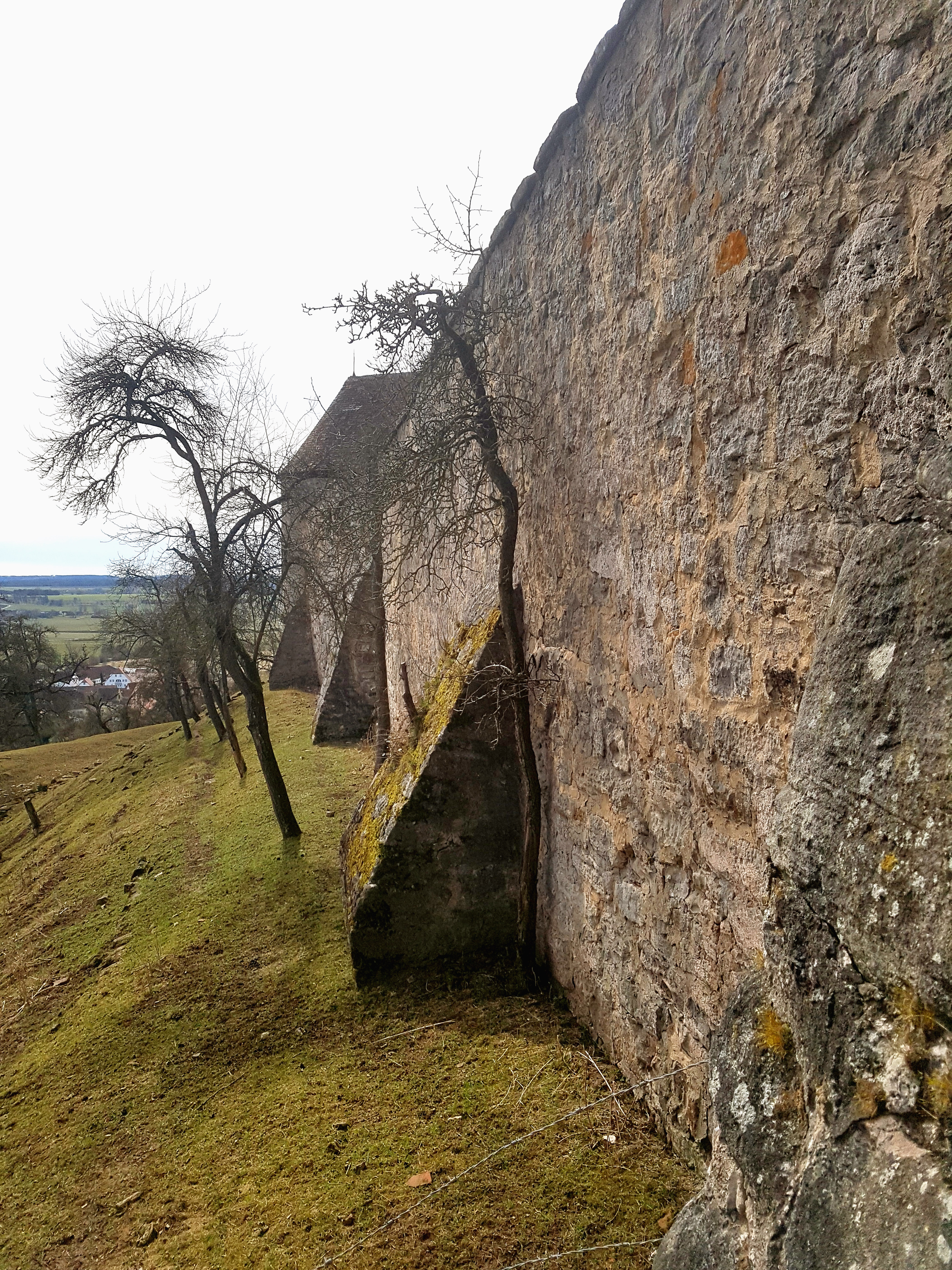 Südöstliche äußere Mauer der Burg Colmberg